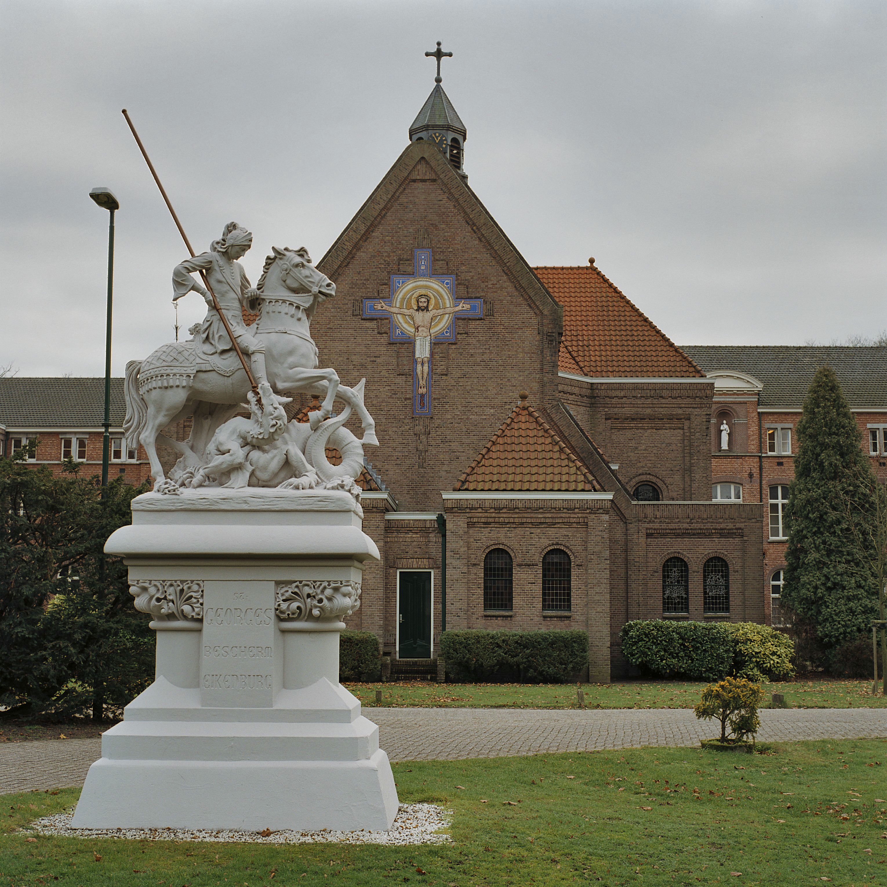 Klooster Eikenburg: Beeld van Sint Joris met de draak voor het klooster van J.Custers uit 1909